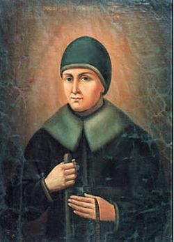 Первая Дивеевская игумения преп. Александра (Агафия Мельгунова). Портрет конца XVIII в.